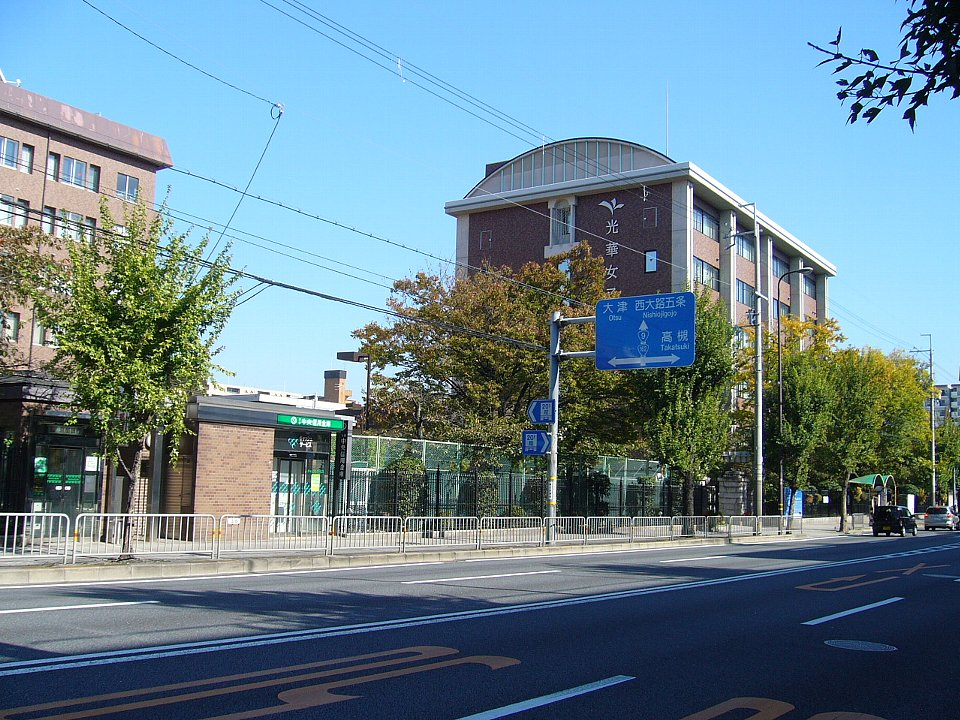 京都光華女子大学 - 2006月11月8日 Bakkai撮影